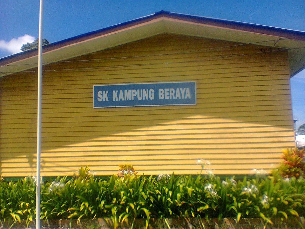 GAMBAR